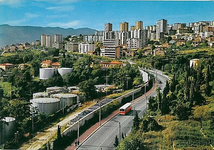 krnjevo, nekad